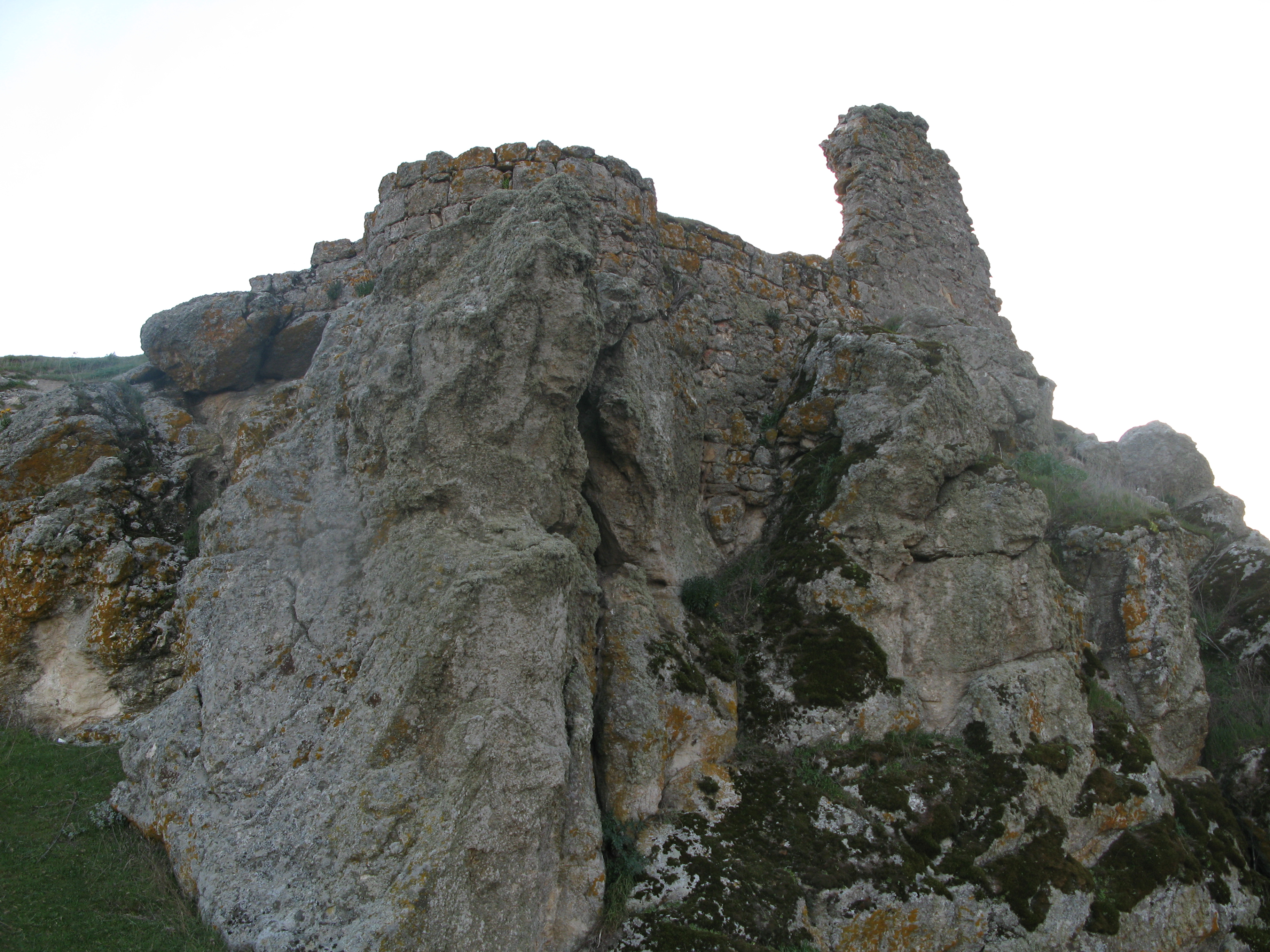 Restos de la muralla del castillo de Peñausende